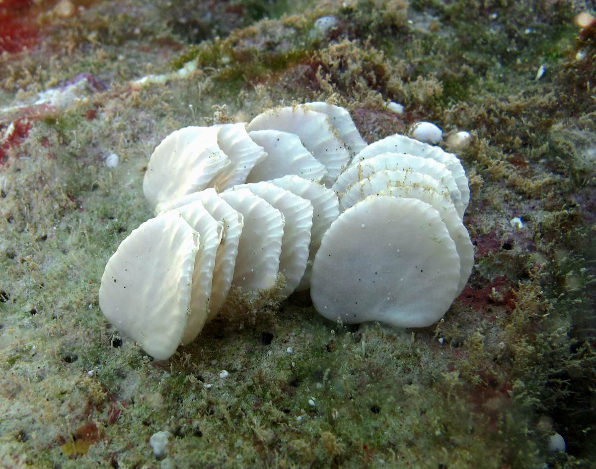 Ponte de coquillages du genre Conus à la Réunion.